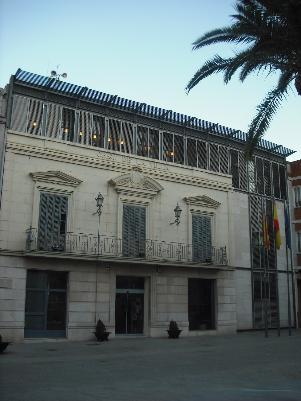 Ajuntament de Massamagrell.